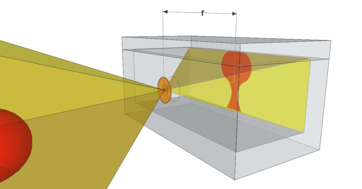 lunghezza focale fotocamera stenopeica